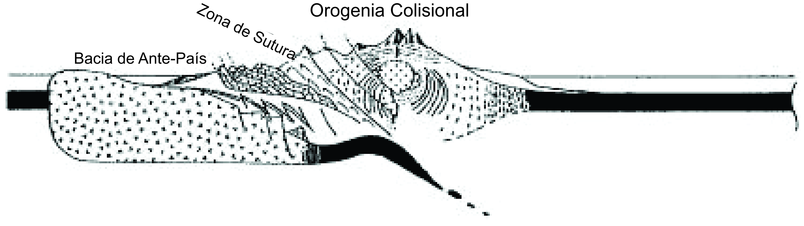 Colisão